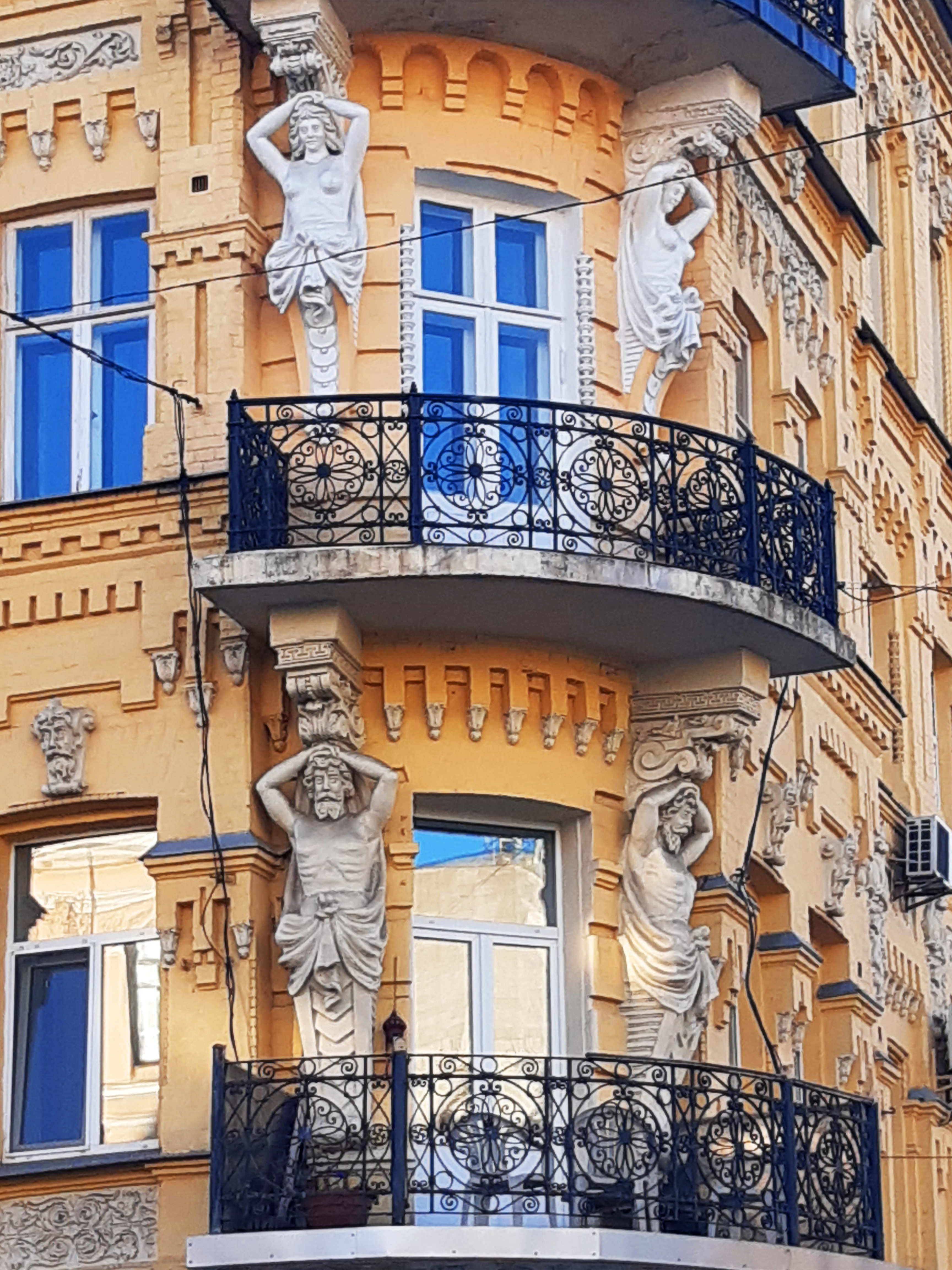 Атланти, Будинок Гольденберга, Київ, вул. Богдана Хмельницького, 33/34